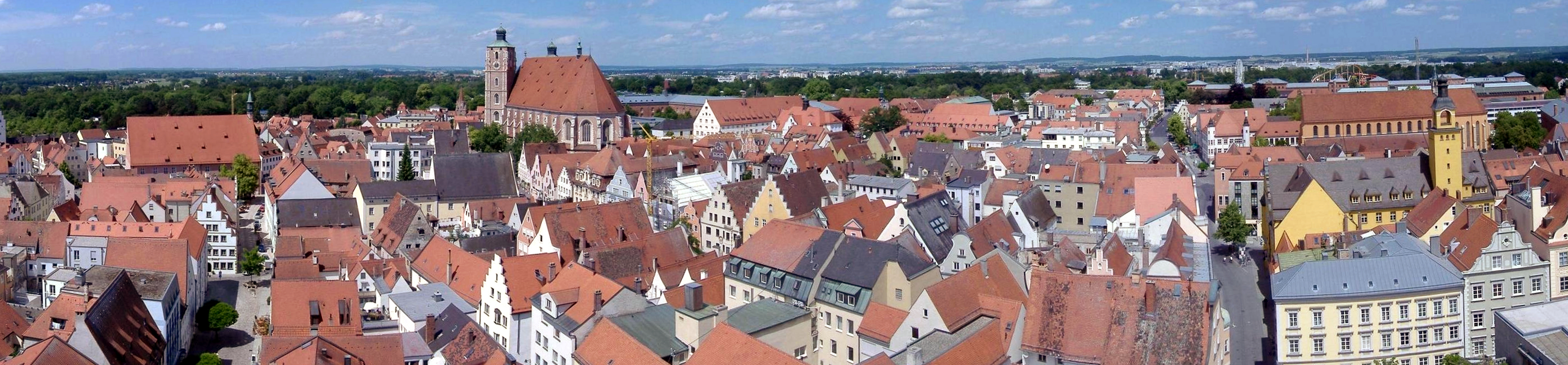 Blick auf die westliche und nördliche Altstadt von Ingolstadt